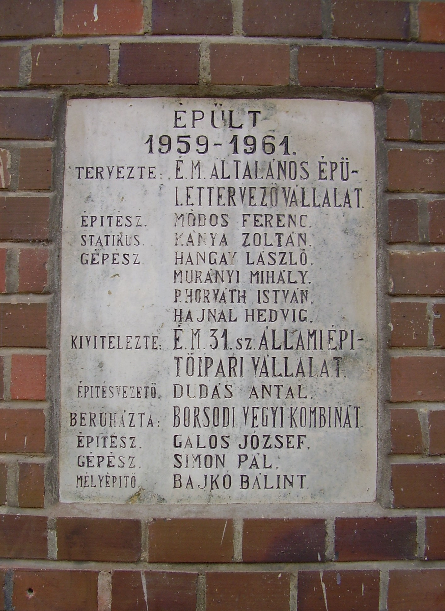 Emléktábla az Irinyi János Református Szakközépiskola és Diákotthon bejáratánál, Kazincbarcika